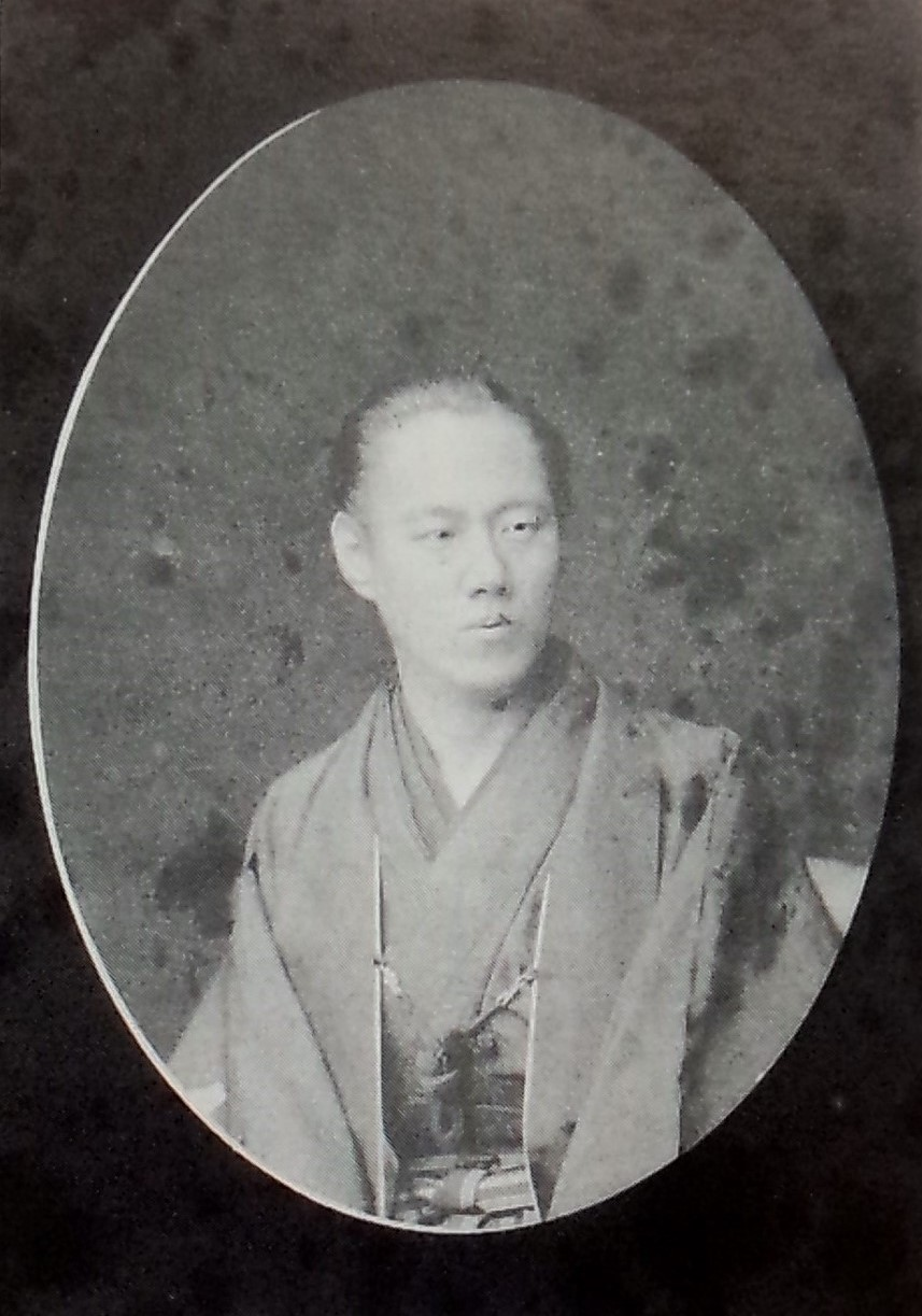 白川資訓の肖像写真。